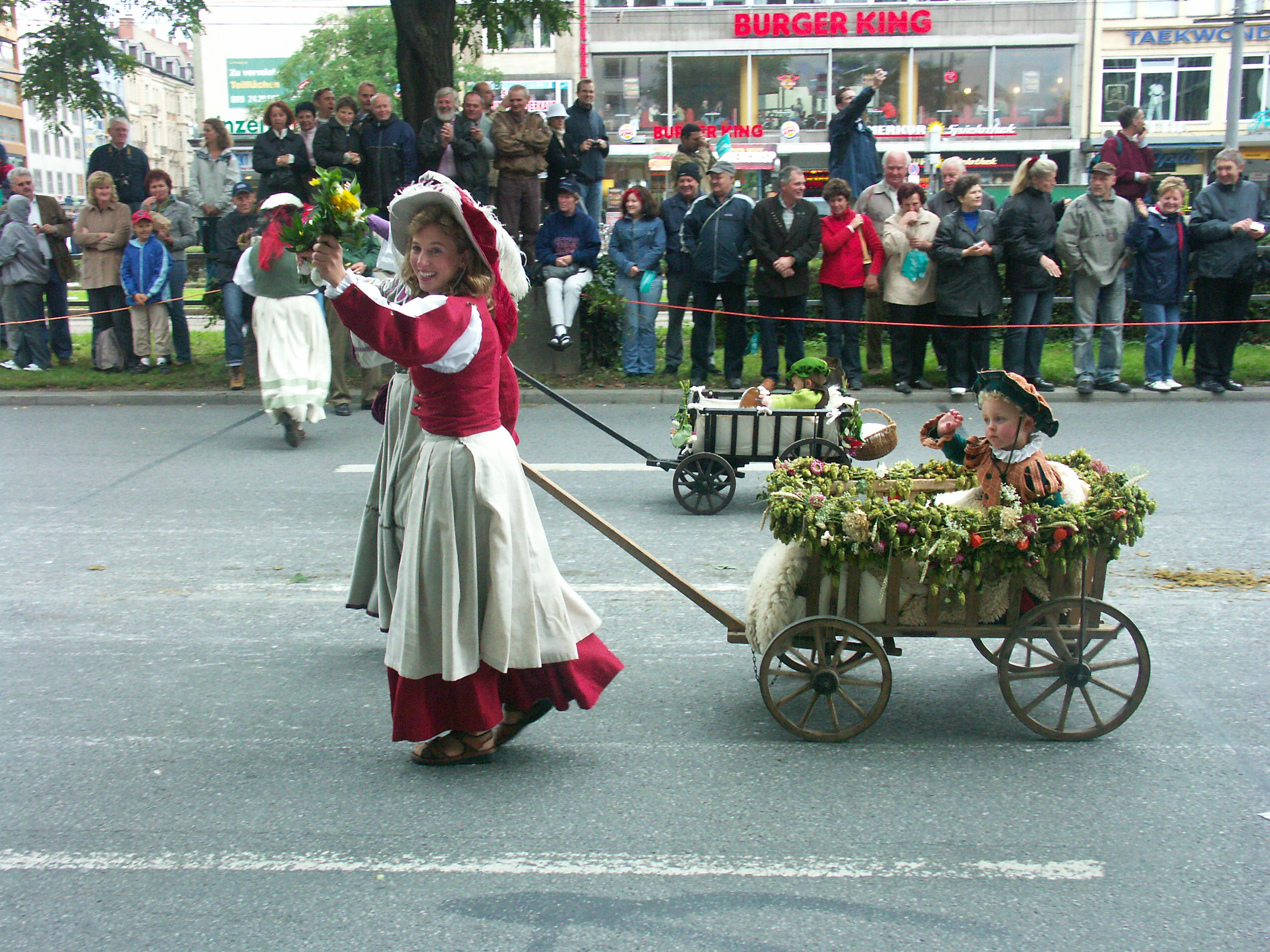 Oktoberfest